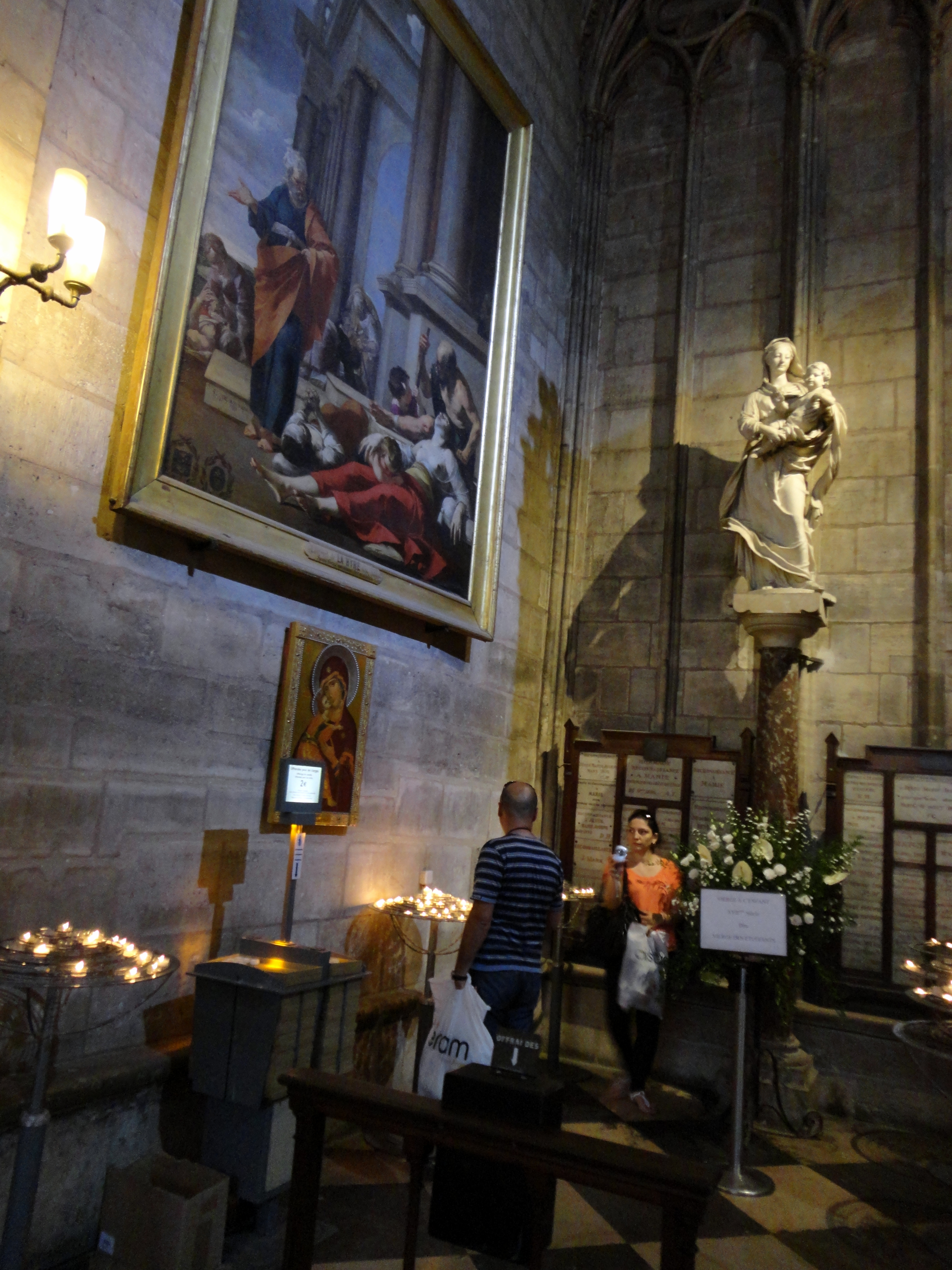 Cathédrale Notre-Dame de Paris